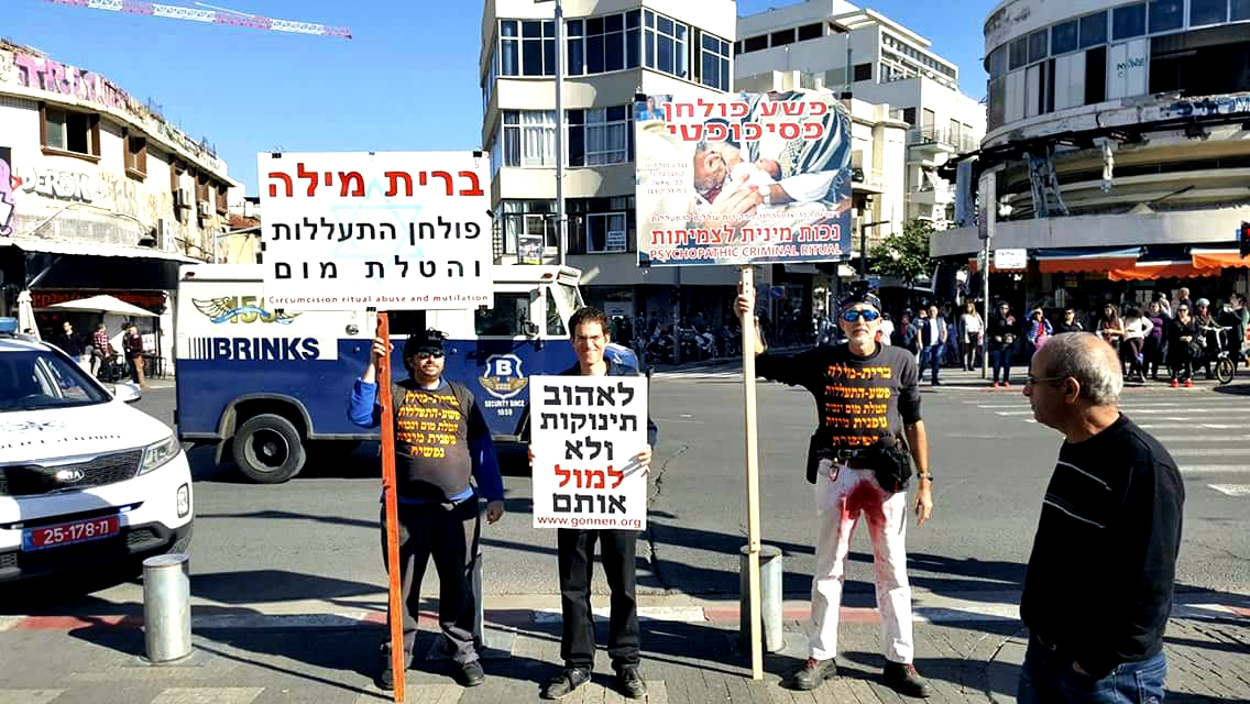 צילום מתוך אחת ההפגנות שנערכו בתל-אביב נגד פולחן הכריתה באברי המין של עוללים זכרים.